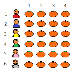 かけ算の順序で説明する、表形式にならべたみかん